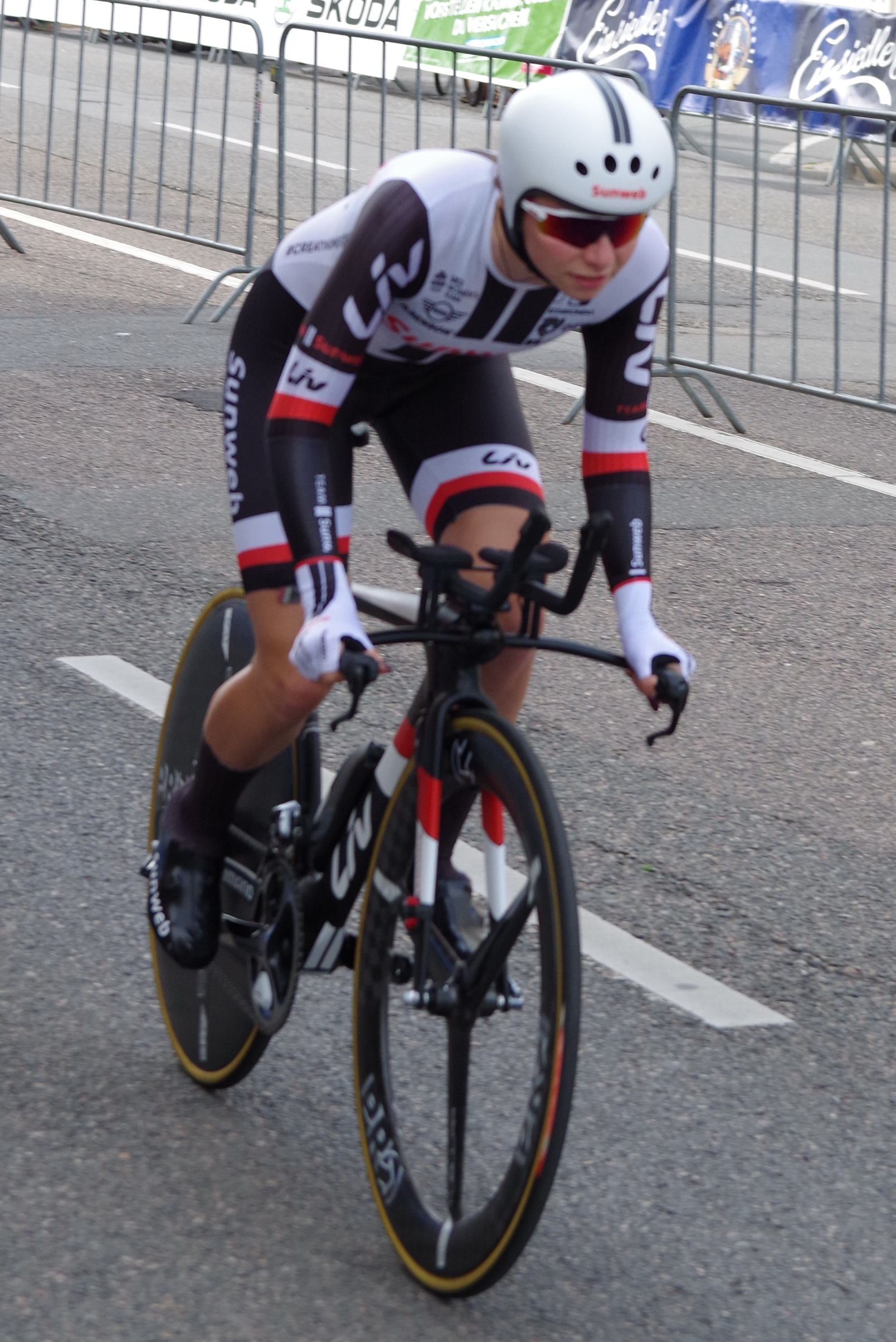 Deutsche Meisterschaften im Einzelzeitfahren 2017 23. Juni 2017 The making of this document was supported by the Community-Budget of Wikimedia Germany.